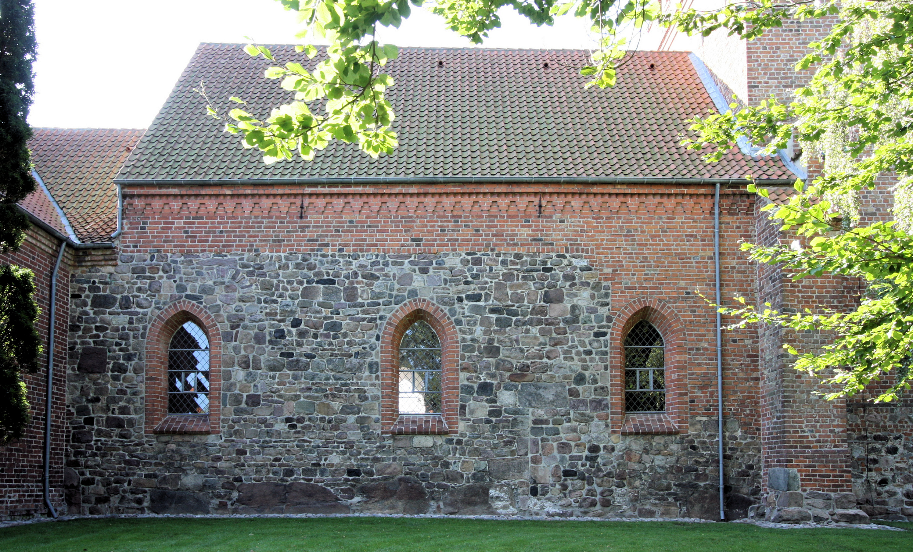 Sankt Peders Kirke in Slagelse, Denmark. From north